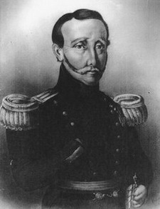 Hindrik Klasen (Klaassens) Borgman, schout en burgemeester van Kloosterburen. Majoor schutterij Groningen.